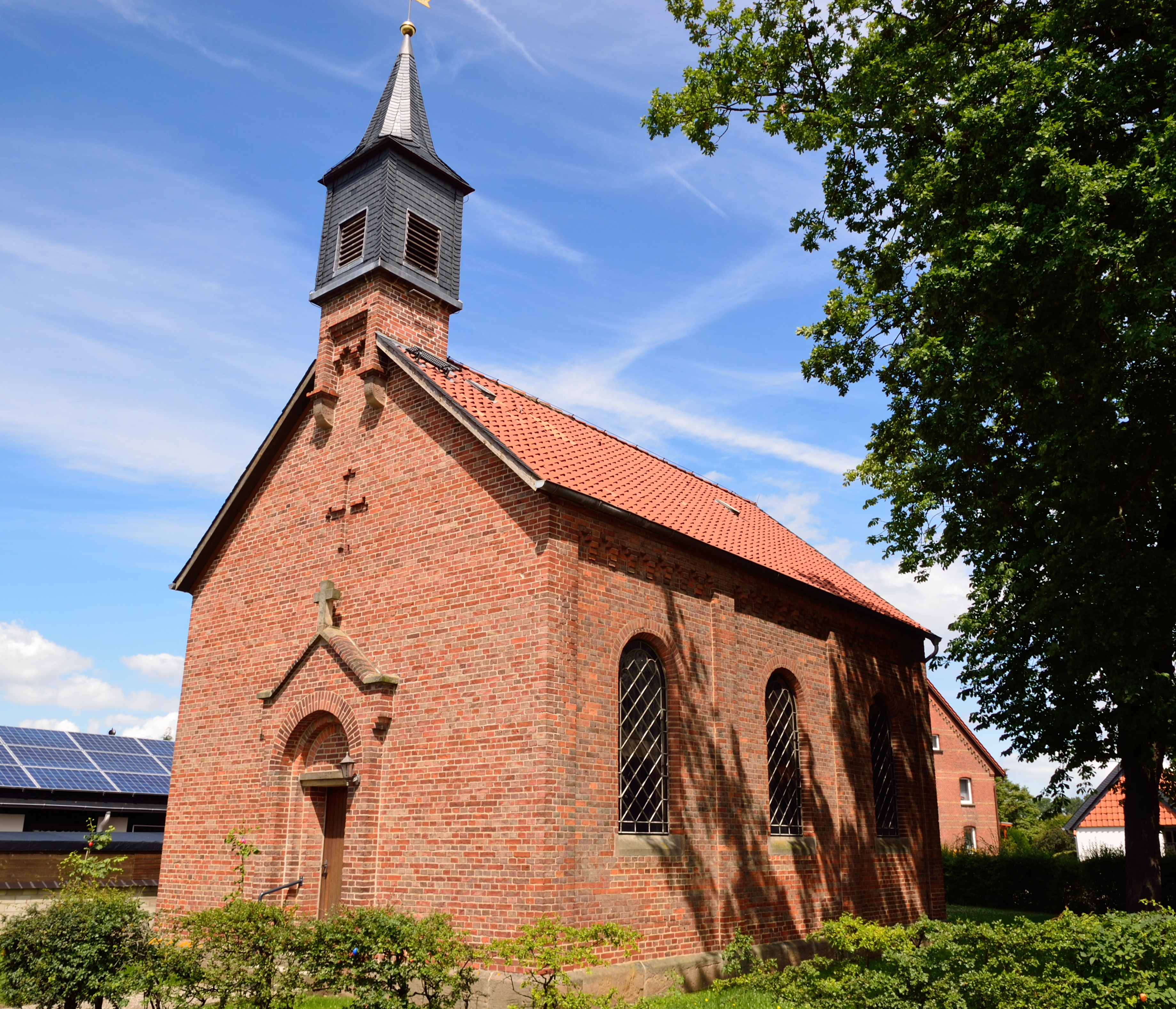 Die Kirche in Harvesse, erbaut 1867/68